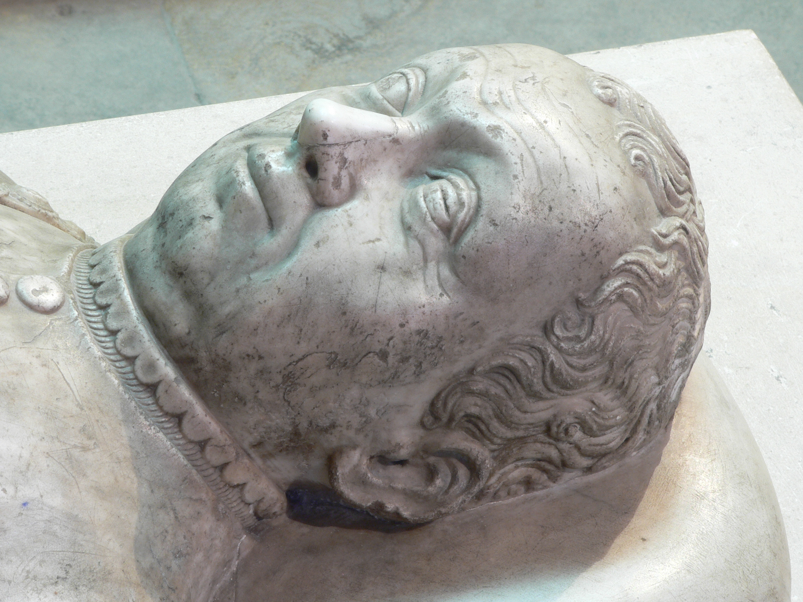 Gisant de Bertrand du Guesclin, connétable de France, dans la Basilique Saint-Denis, près de Paris